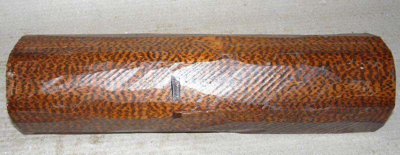 snakewoodlabel QS:Lde,"Schlangenholz", Brosimum guianense